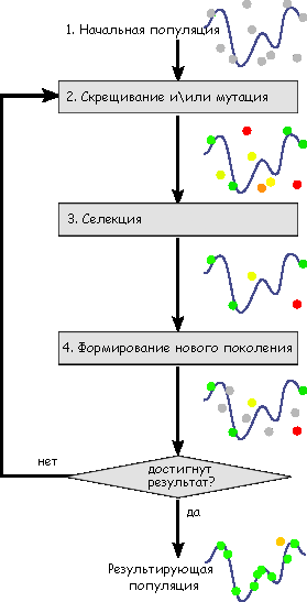 Генетический алгоритм